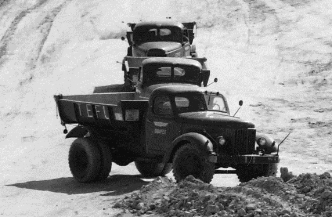 ZIL-MMZ-585 beim Bau der ungarischen Autobahn M1 (1962).